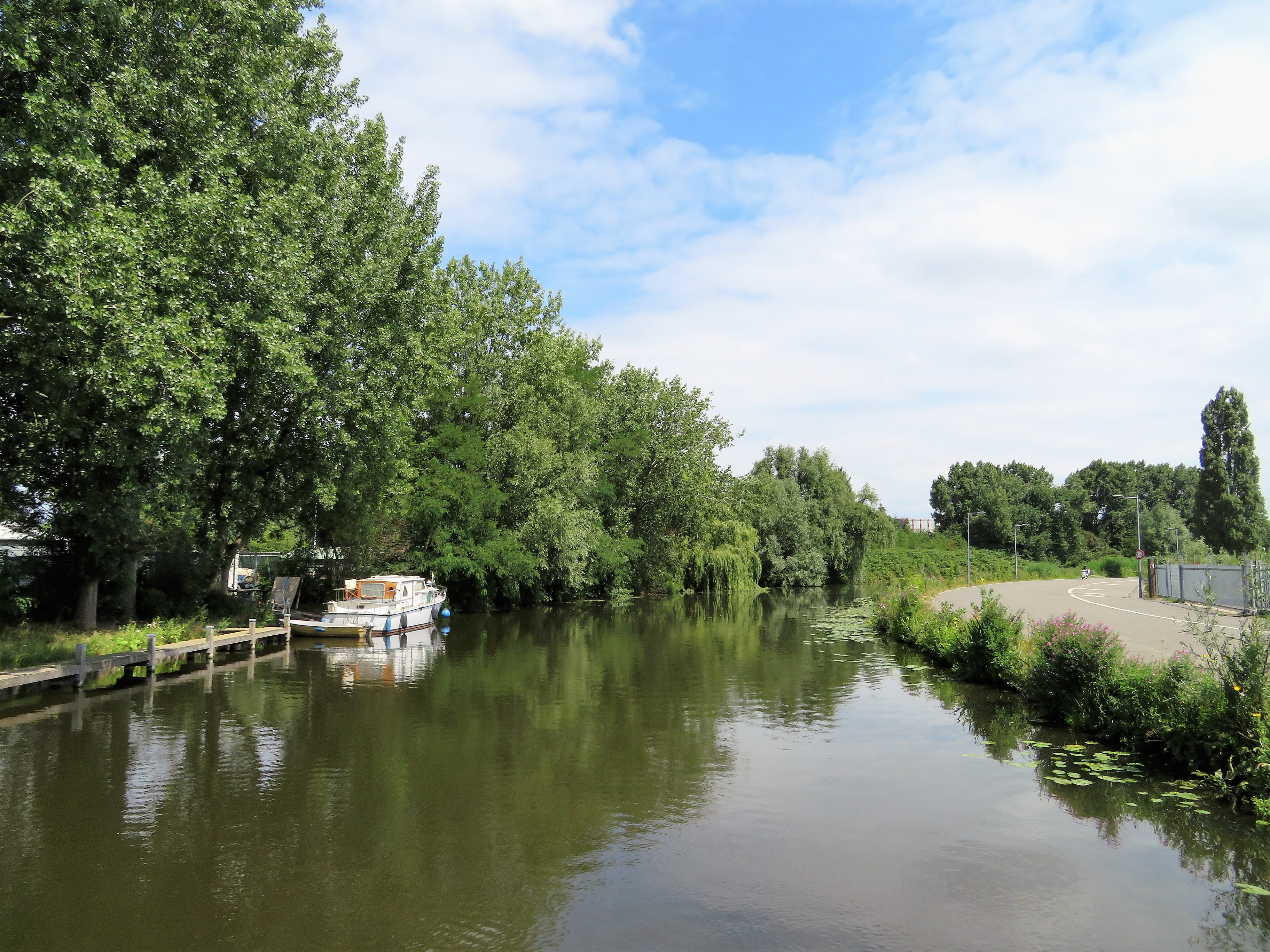 Schiedamse Schie tussen de Oost-Abtsbrug en de Rolbrug bij Huis te Riviere